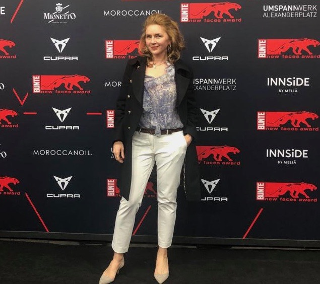 Valentina Sauca beim Bunte New Talents Awards 2019 Photo Ninon Bohm